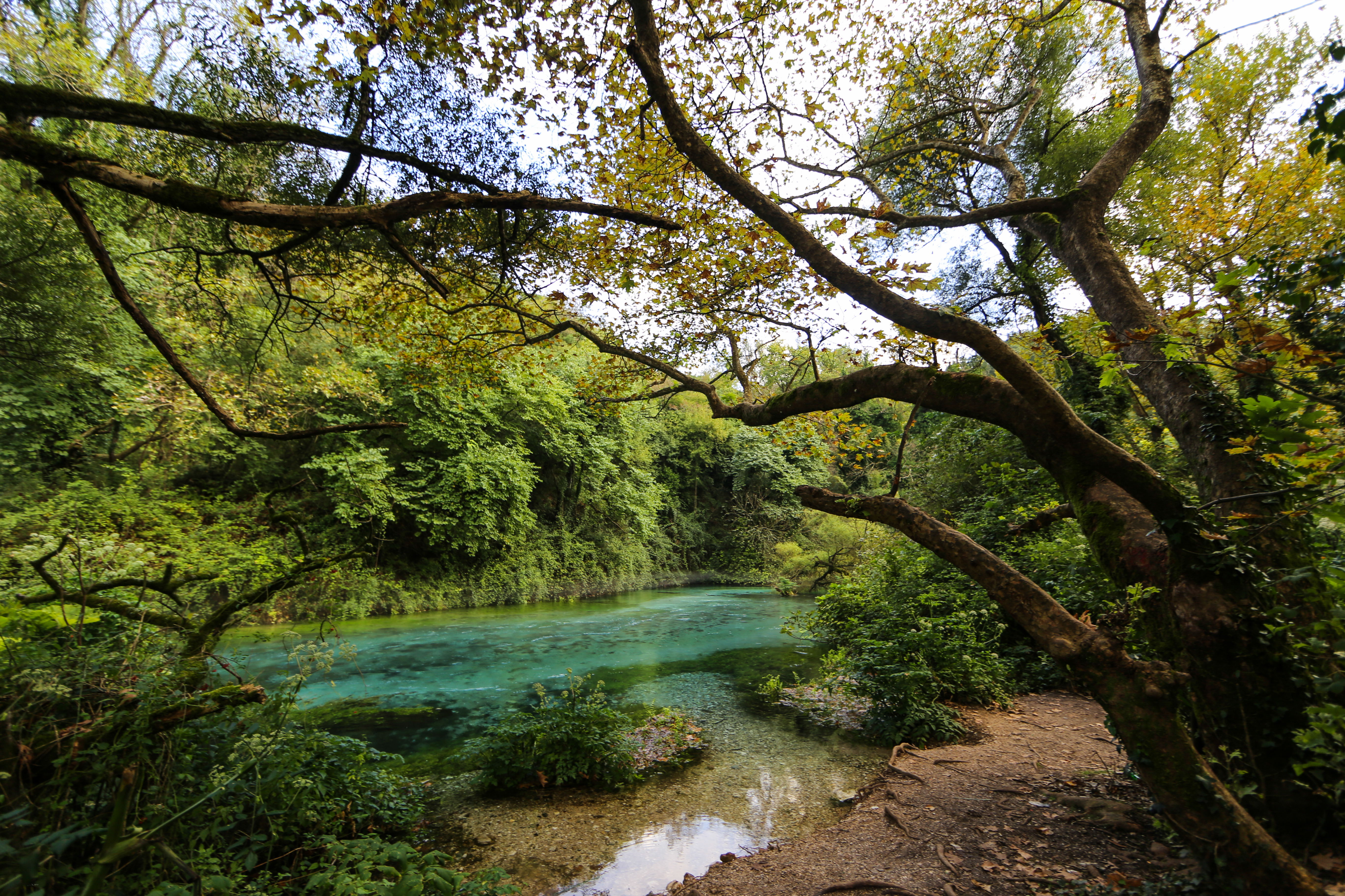 Syri i Kalter, Delvine